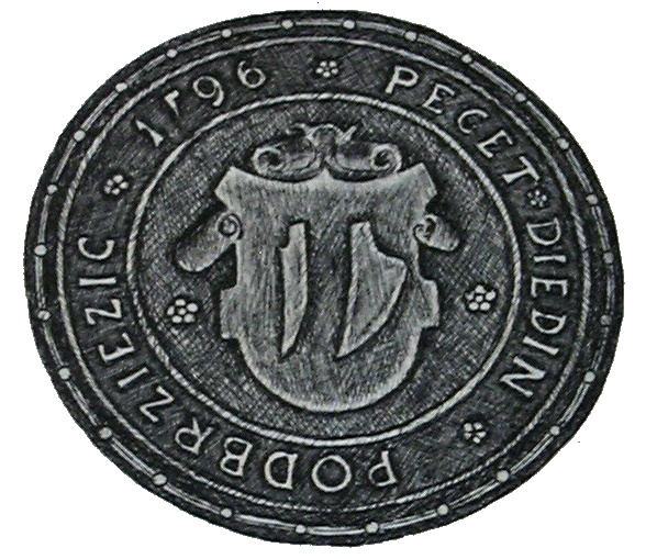 Stará Podbřežická pečeť z roku 1596 (Vyškov- Czech republic)